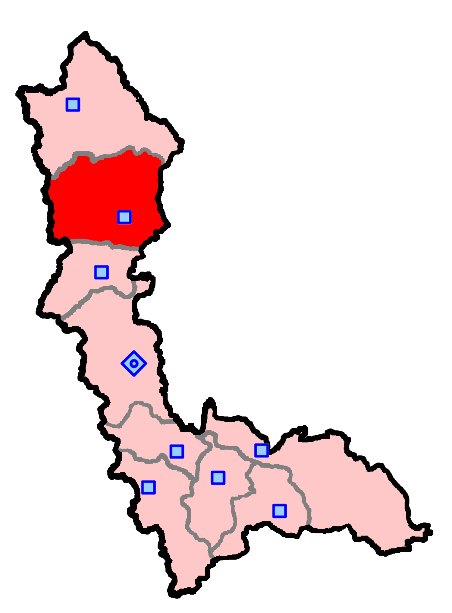 حوزهٔ انتخاباتی خوی و چایپاره برای انتخابات مجلس شورای اسلامی